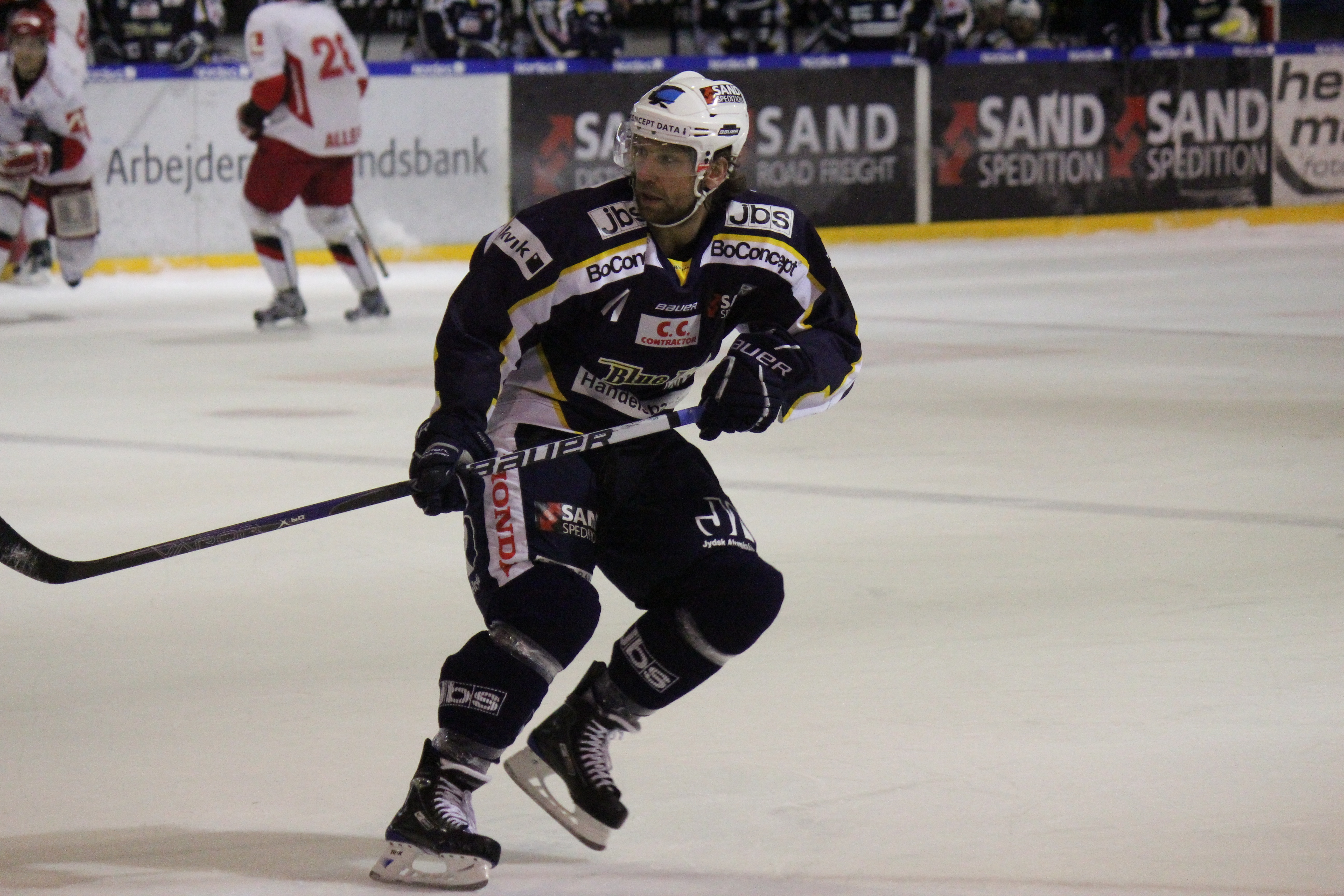 Kim Staal under kamp mellem Herning Blue Fox og Rødovre Mighty Bulls - 15/3-11. Herning vandt kampen 4-0